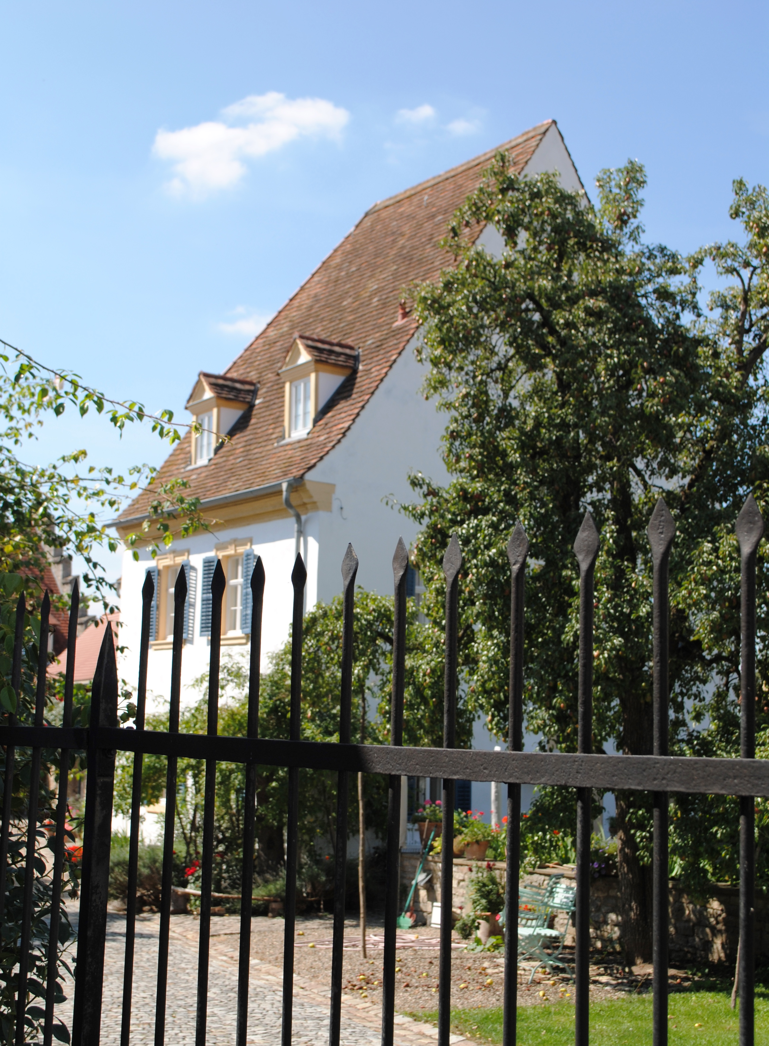 Villa Sommerach, SommerachThis is a photograph of an architectural monument.